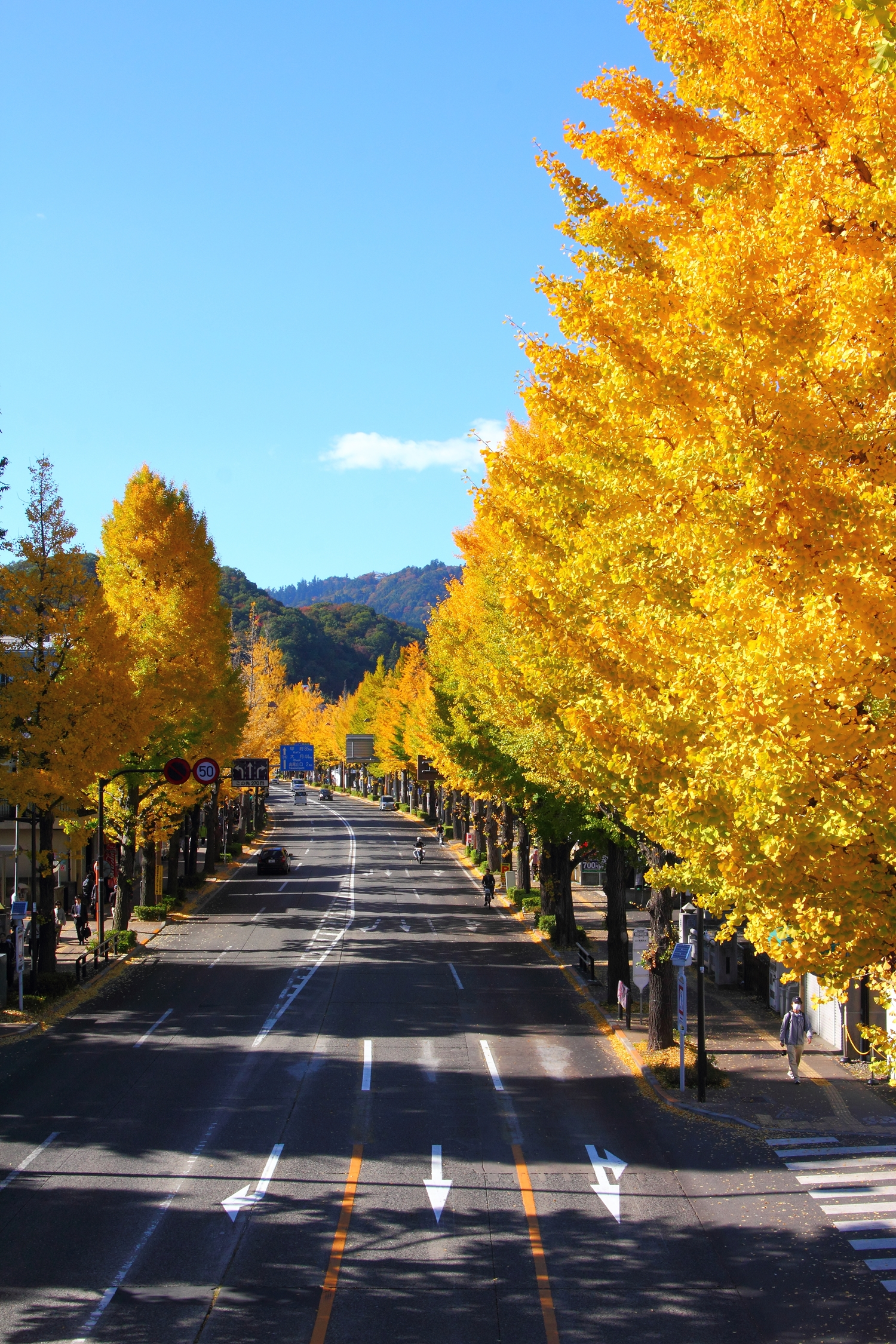 国道20号、高尾駅近くのイチョウ並木